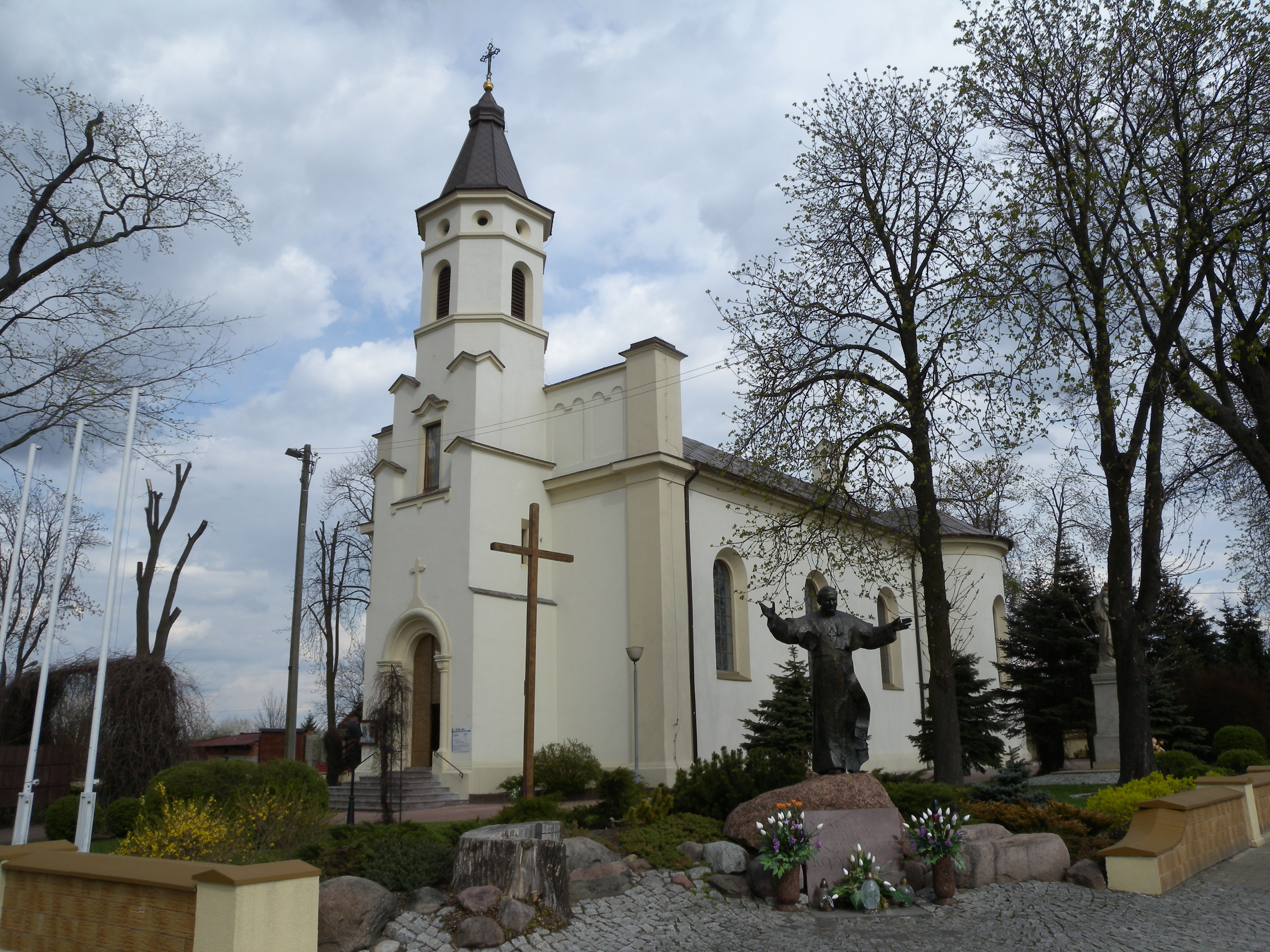 Zespół kościoła parafialnego pw. św. Witalisa Męczennika wraz z otoczeniem: kościół, 1860-62, 1927-30, z wyposażeniem barokowym plebania, 1912-16